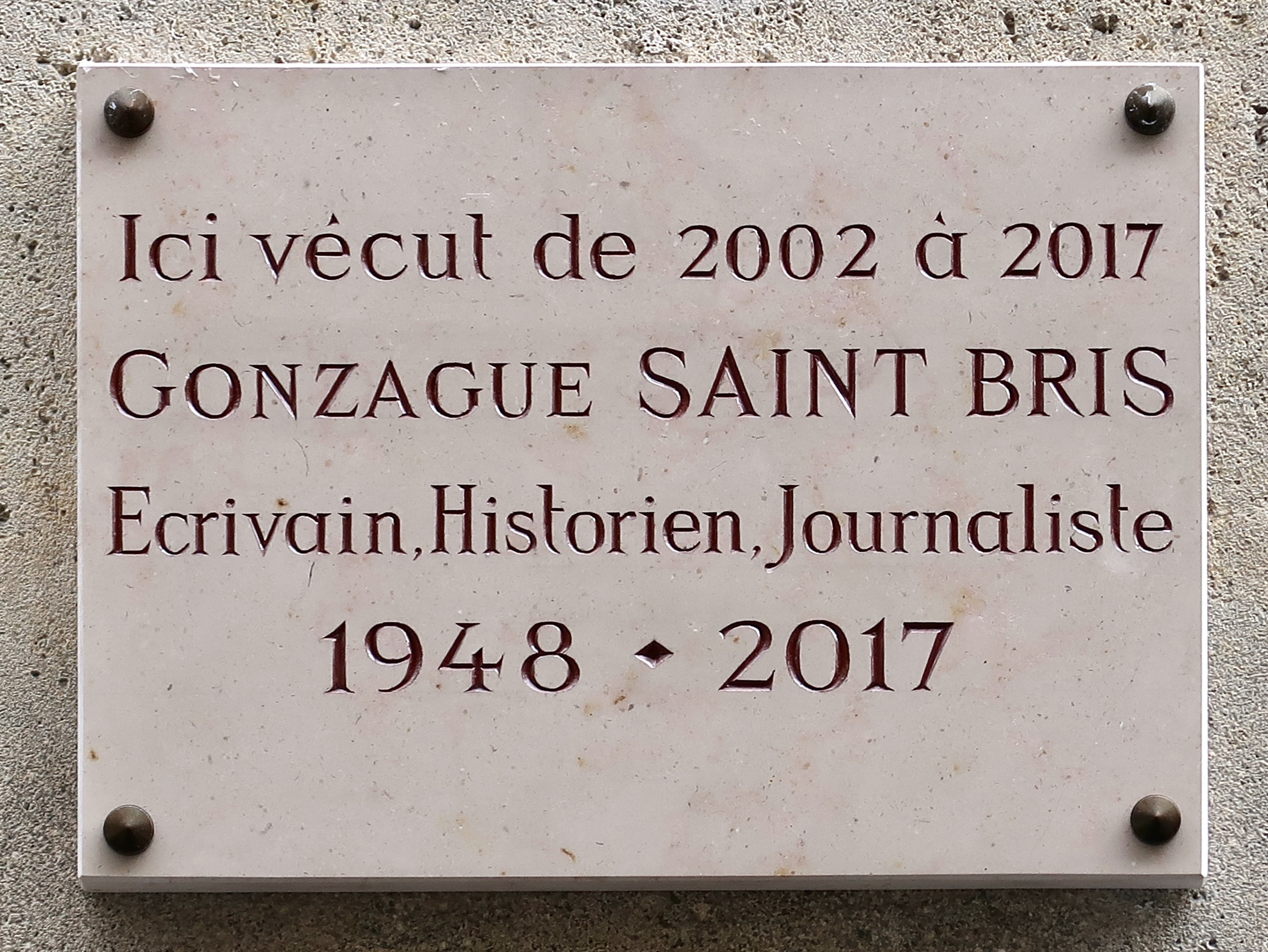 Plaque en hommage à Gonzague Saint Bris, 5 rue Pelouze (Paris, 8e).